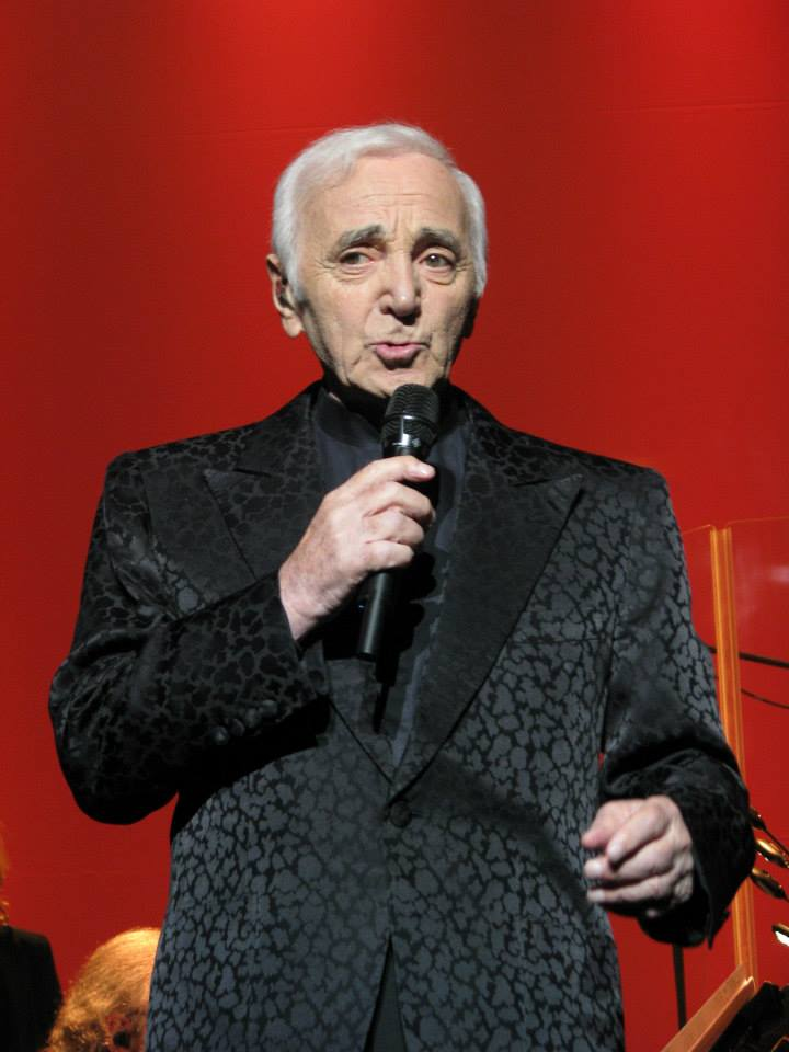 Charles Aznavour (b. May 22, 1924) – French singer